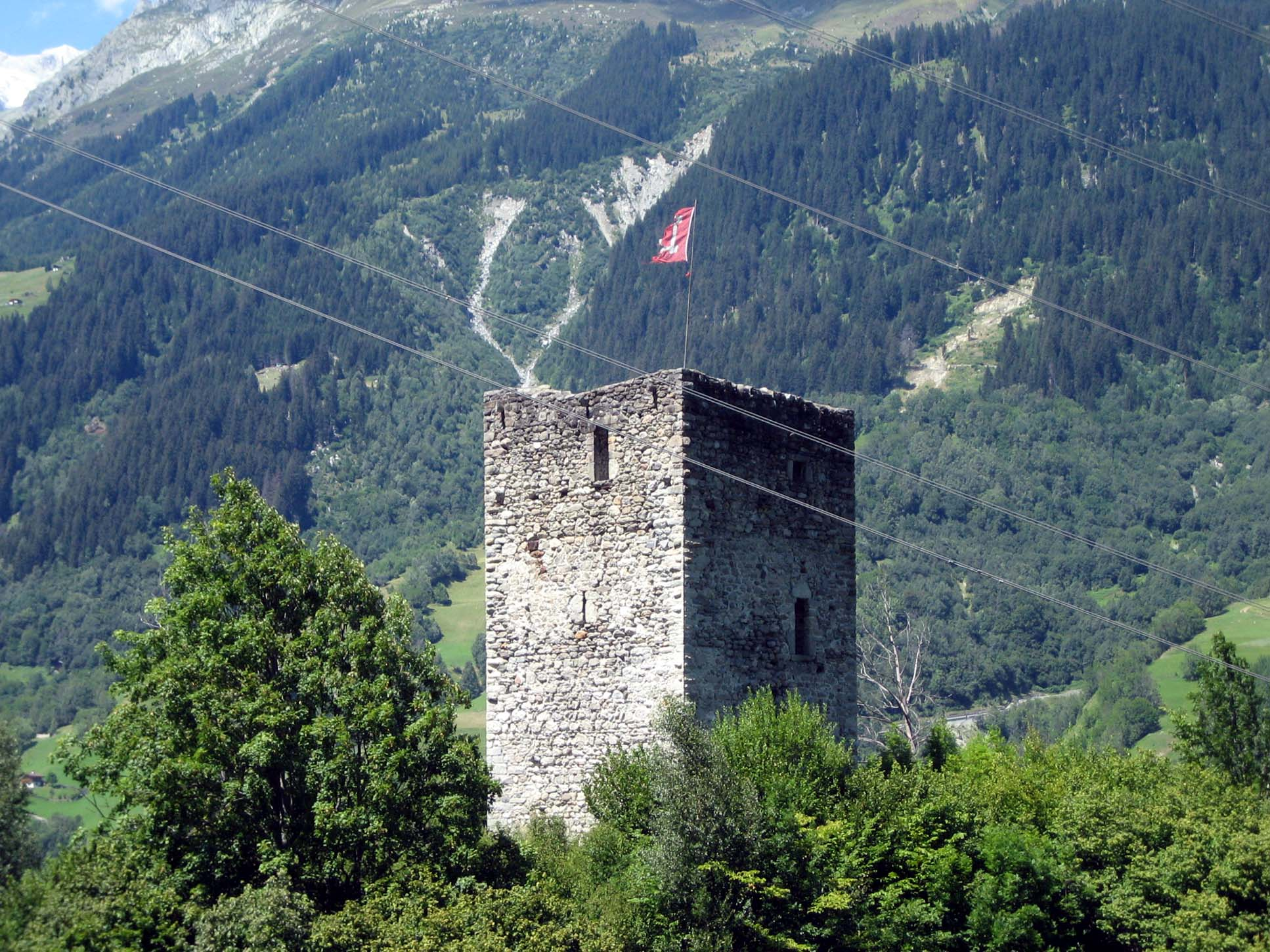 Lage